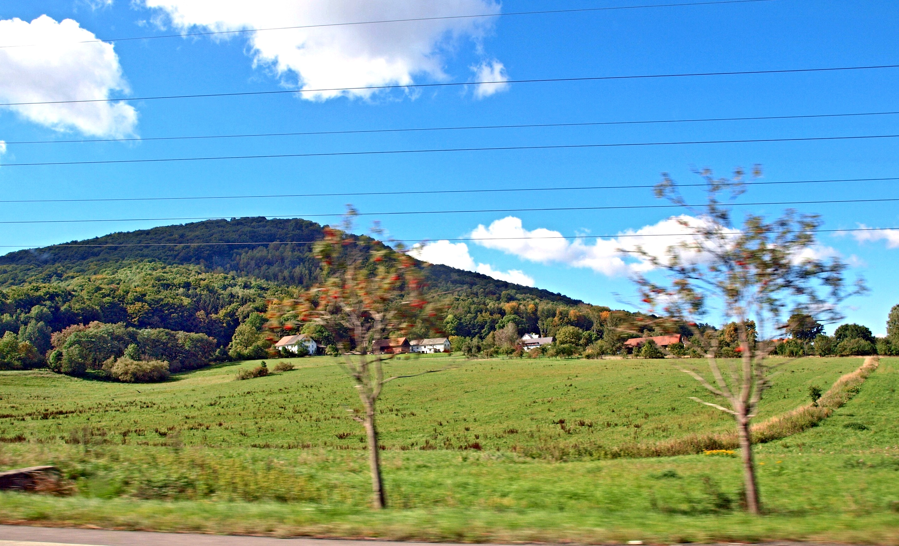 Postřelná